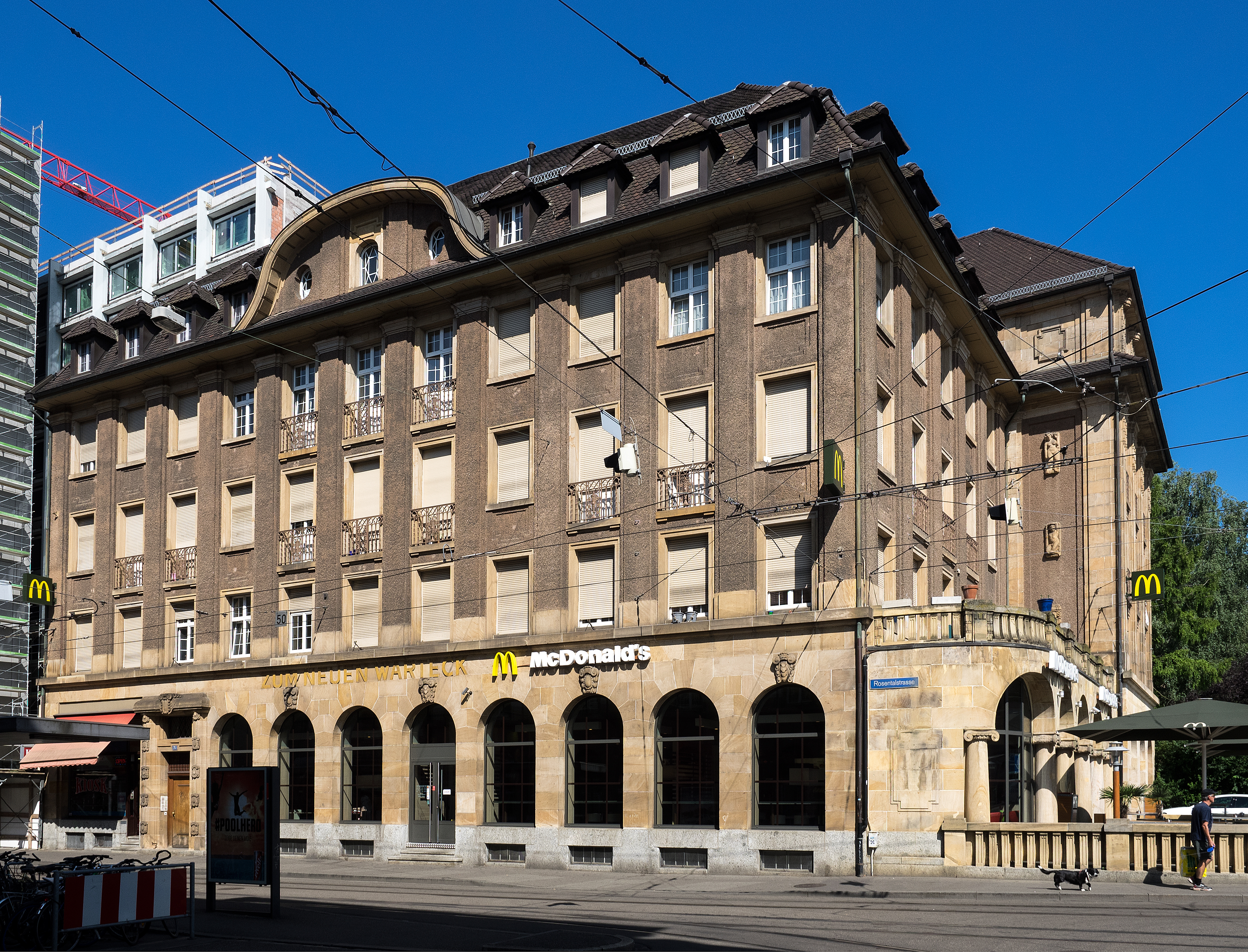 Restaurant zum neuen Warteck, Basel